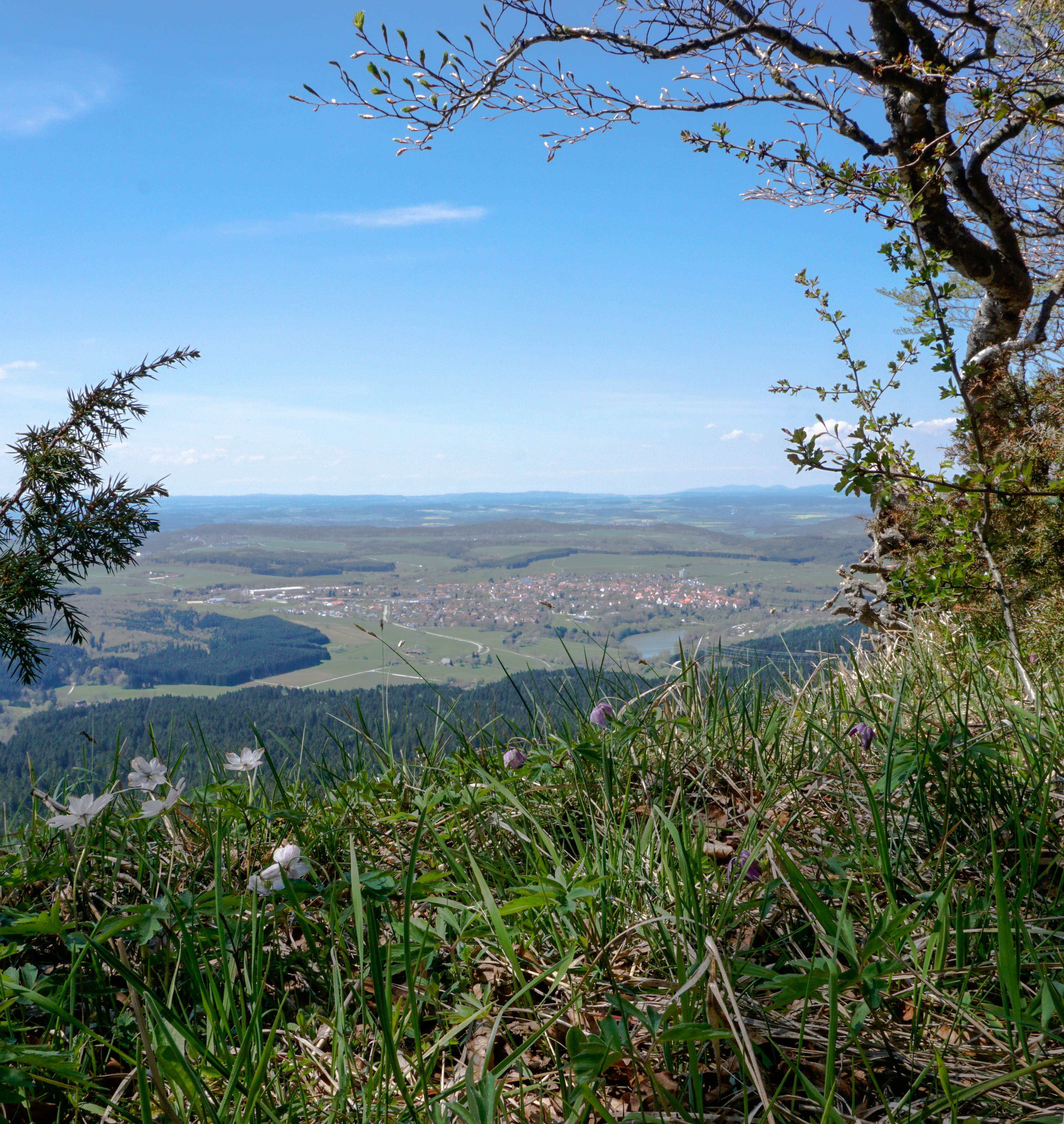 Naturschutzgebiet Plettenkeller, Schutznummer 4.120, im FFH-Gebiet "Östlicher Großer Heuberg" Schutznummer 7819-341 auf dem Plettenberg